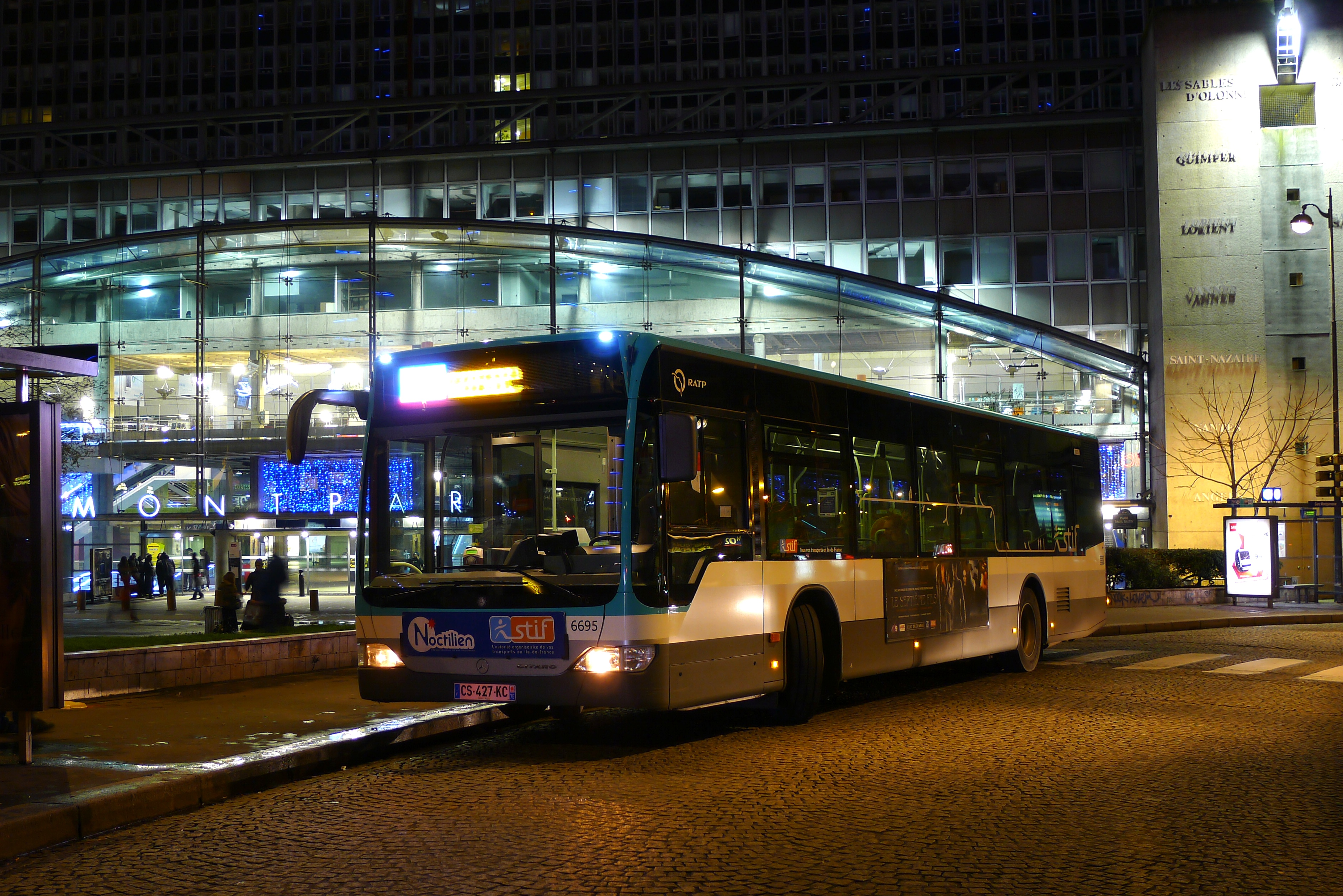 Premier Noctilien à entrer en service sur le N66. Citaro 1.2 Facelift 6695